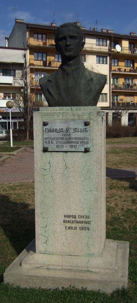 Споменик Синише Јанића, Власотинце.